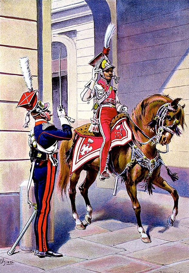 En chemin vers la parade : lancier polonais de la Garde impériale saluant un officier supérieur du régiment.